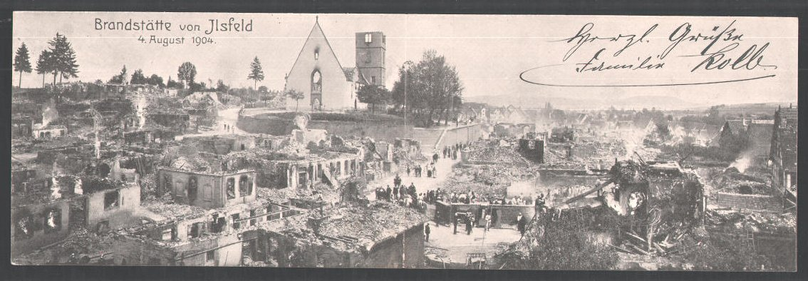 Brandstätte von Ilsfeld 1904